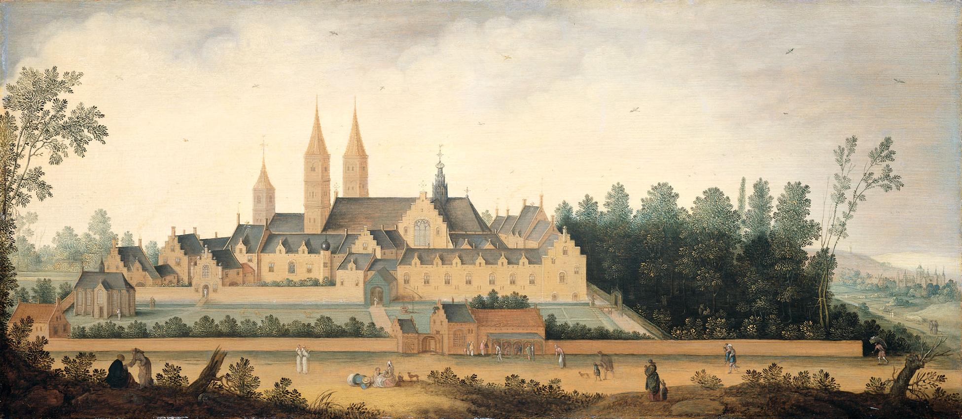 Pendant of File:Kasteel Egmond 1638.jpg